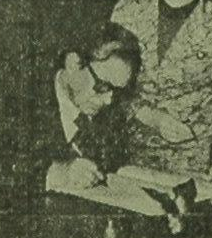 Canciller Juan Carlos Puig firmando un convenio entre Argentina e Italia.